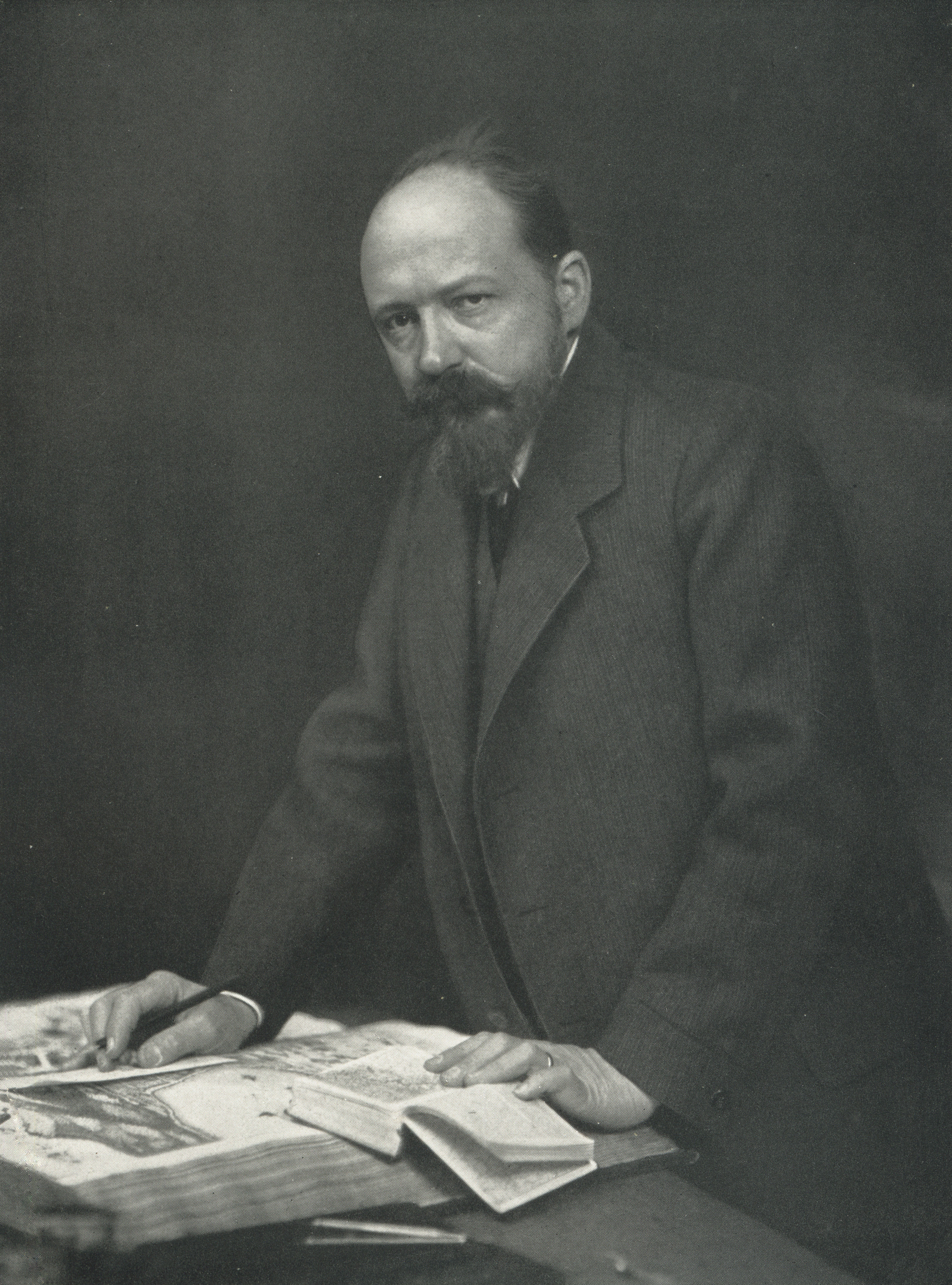 Der deutsche Burgenforscher Bodo Ebhardt